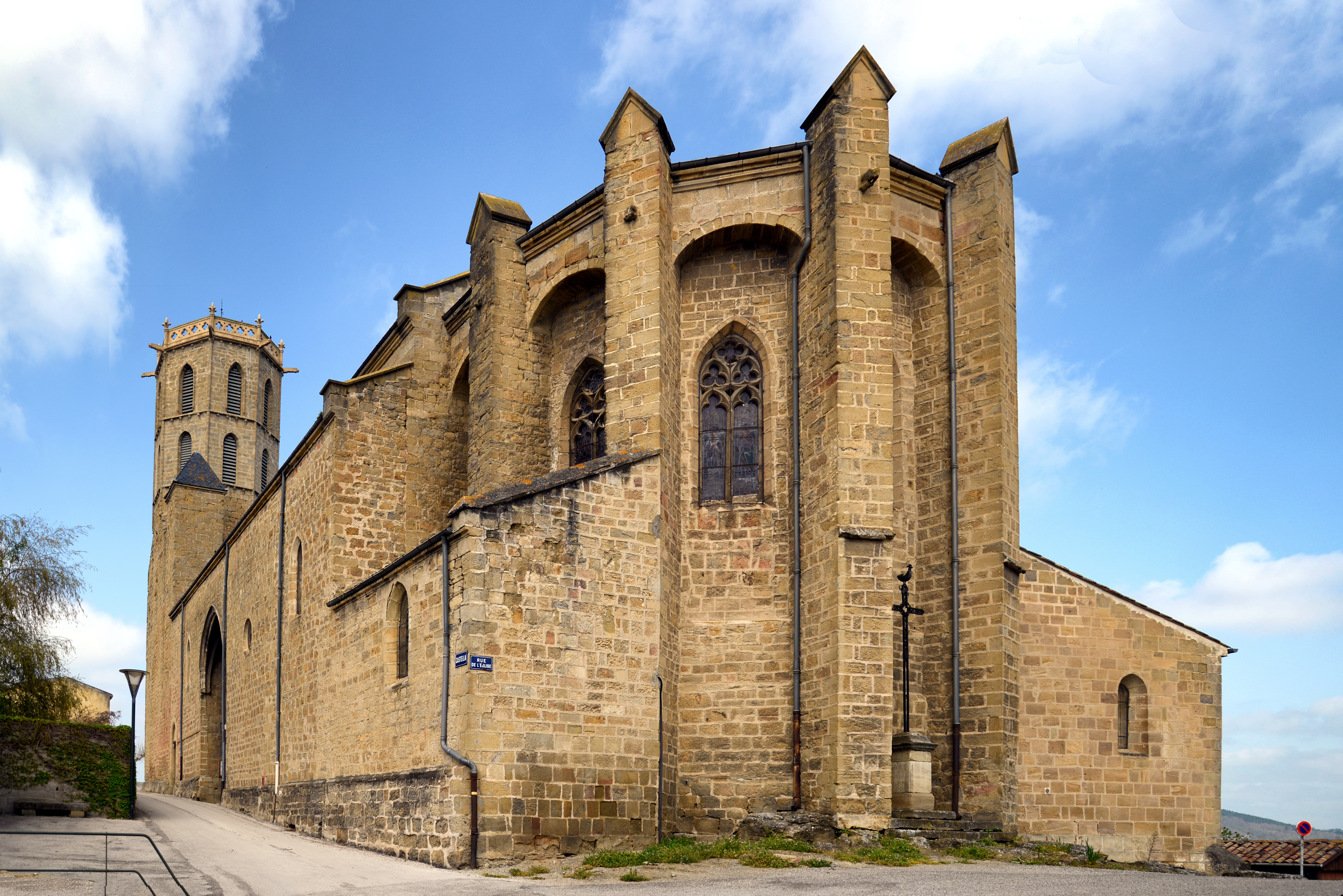 Laroque_d'Olmes; Ariège (Midi-Pyrénées) - Vue 3/4 du chevet de l'église du Saint-Sacrement